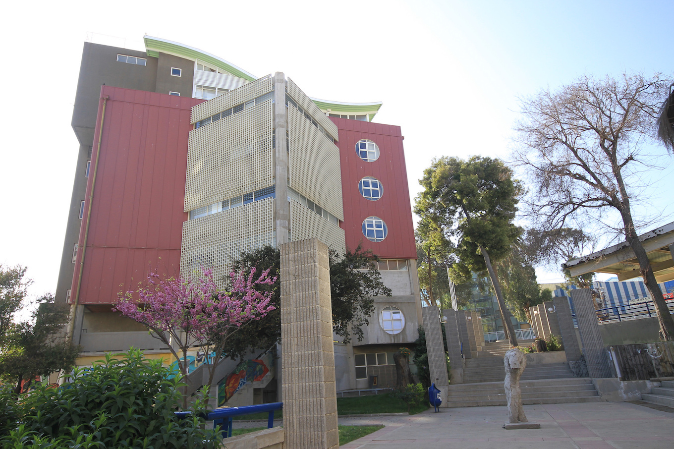 Institucional UPLA